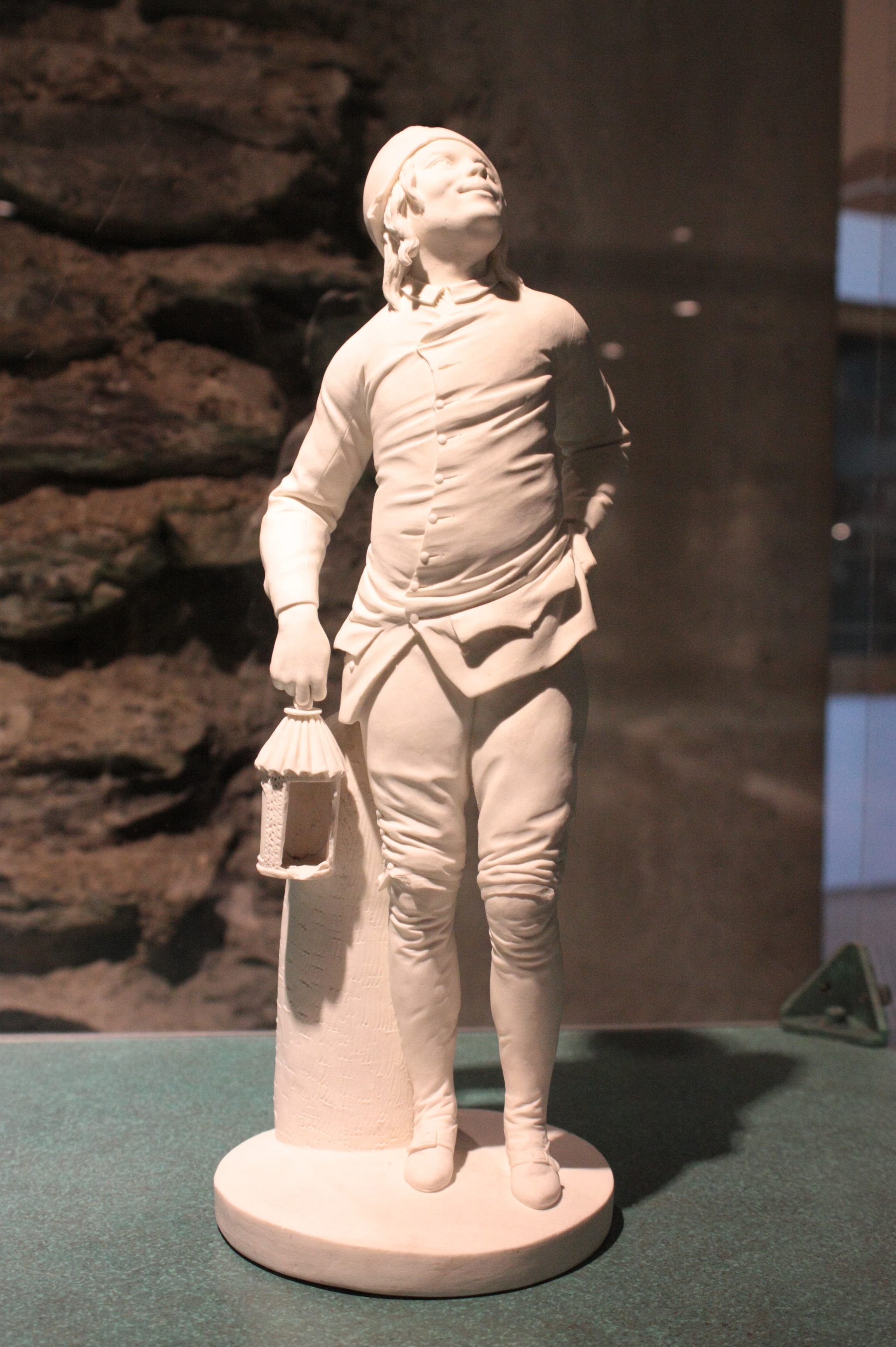 Janot par Josse-François-Joseph Leriche, Biscuit de Sèvres, 1779